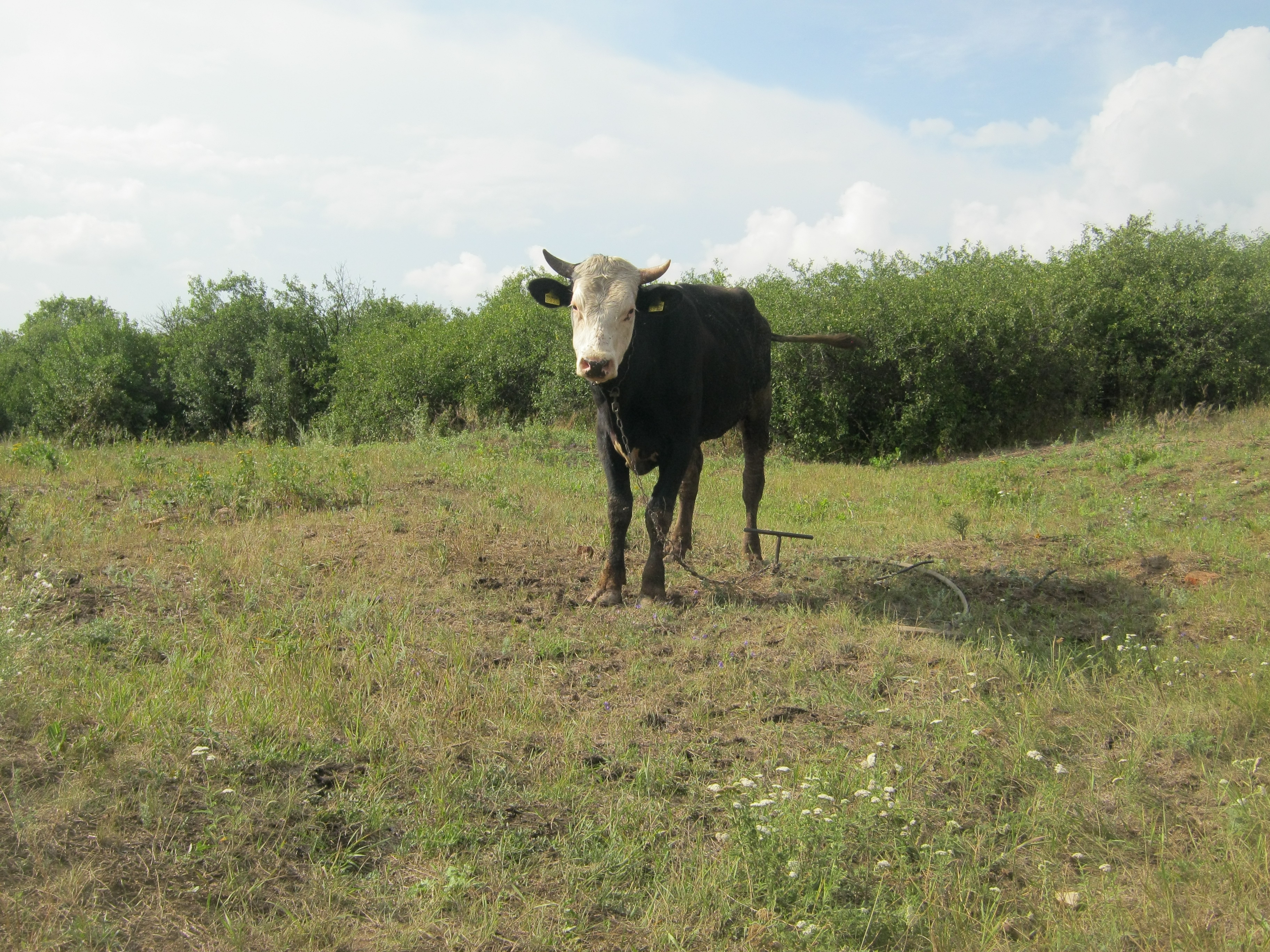 Бык домашний в селе.